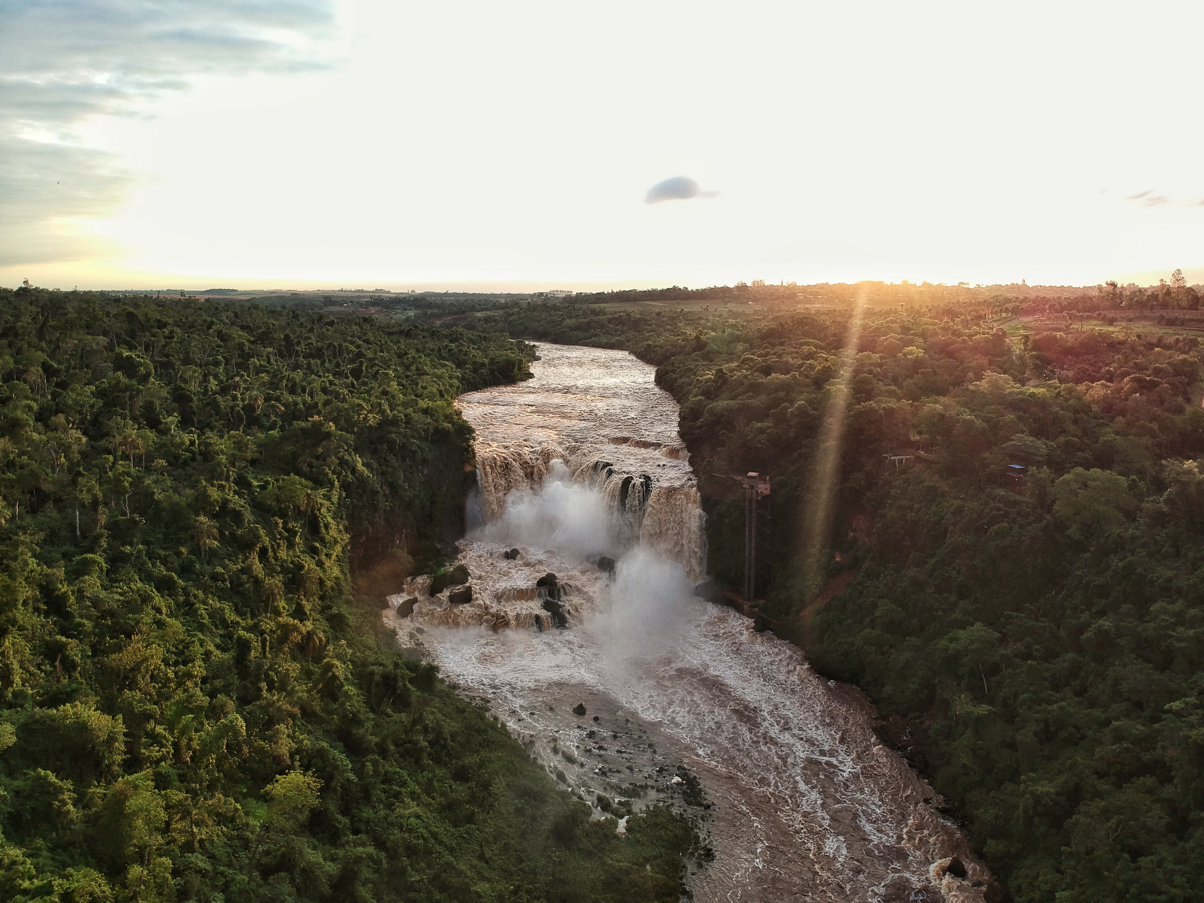 Toma aérea en un atardecer del salto Monday en Paraguay, accesible desde Ciudad del Este.